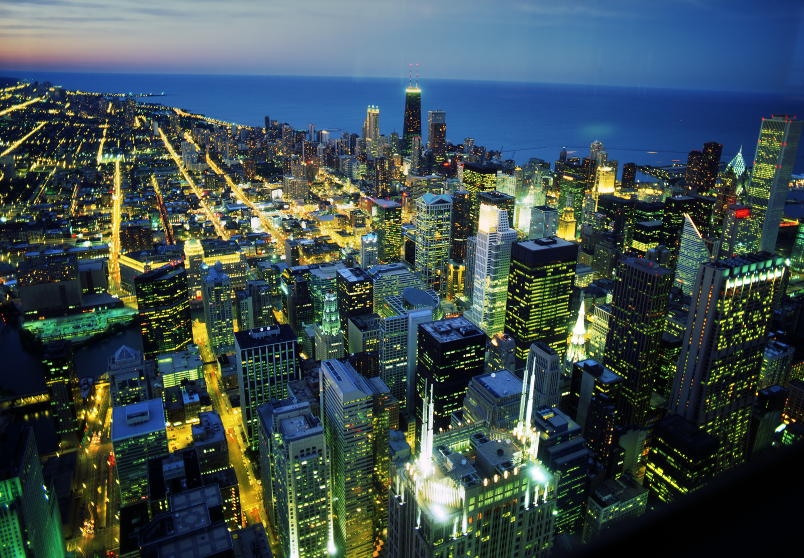 Gesig uit die Willis Tower op Chicago se stadskern